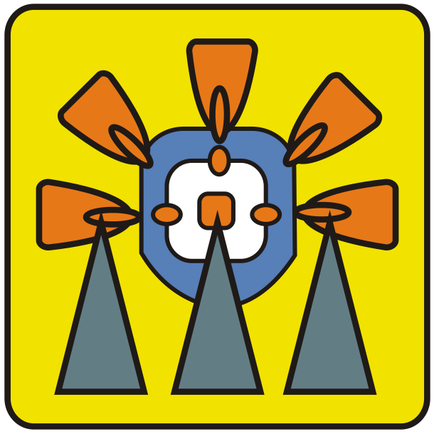 Escudo del Municipio de Jose Maria Morelos